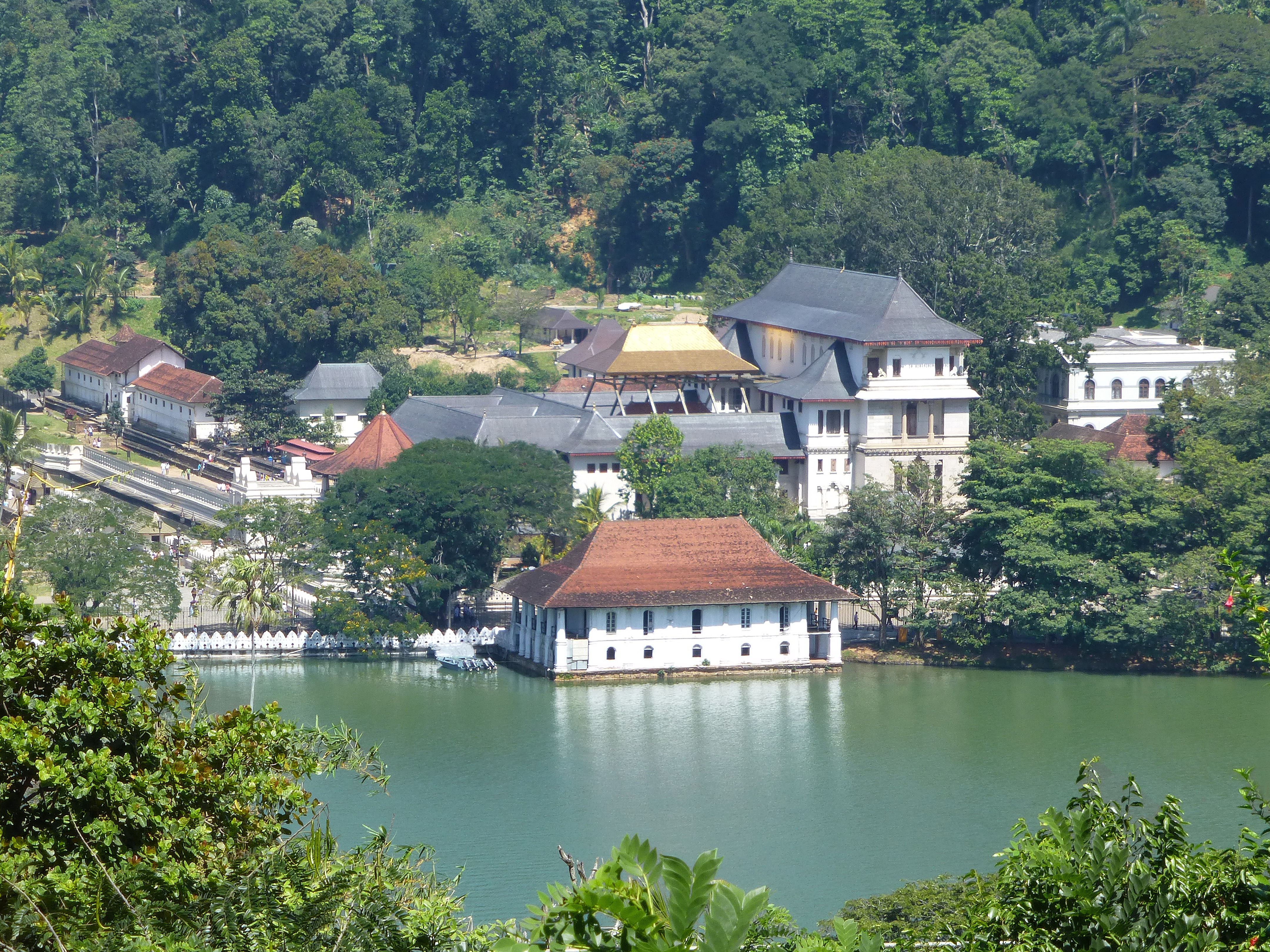 Kandy (Sri Lanka) : anciens bains royaux au bord du lac